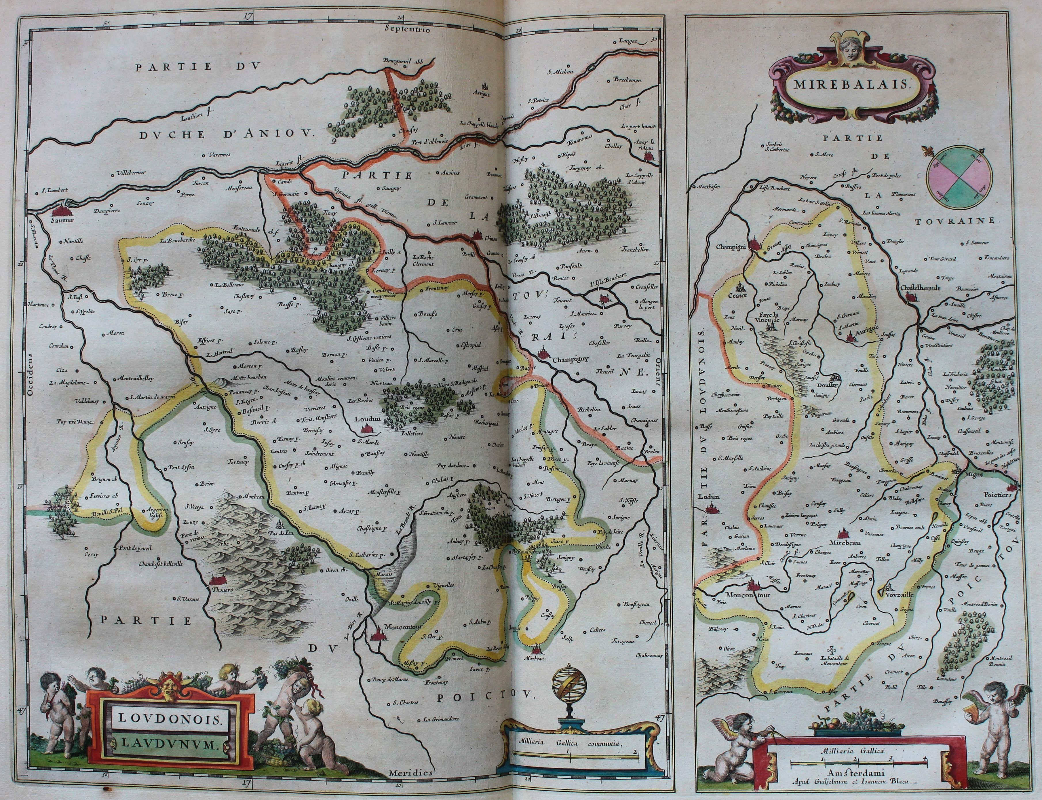 Descripción bibliográfica: Geographia Blaviana. - [Amsterdam : Juan Blaeu, 1659] . - [32], VI, 96 p., 34 f., h. 35a, 35b, 35c, 35d, 36-44 f., 34, [2], 36-40, [2], 43-70 [i. e. 75], [1] f., [20] p. de map., [9] f. de map., [4] f. pleg. de map., [2] f. de plan., [2] f. ge grab. : |bil. ; |cFol. marca major (57 cm.) . - En la dedicatoria a Felipe IV: "Presenta ... El Atlas Universal y Cosmographico de los orbes y terrestre ... Juan Blaeu" . - Título tomado del frontispicio. -- Privilegio fechado en 1659. -Errores de pag. - Sign.: 1, *2, **3, ***-****2, a-e2, A-I2, K1, L-Z2, Aa-Dd2, 4 2, Ee-Ff2, A-I2, K1, L2, M1, N-Y2, Z5, Aa-Dd2, Ee1, A-D2, E-F1, G-I2, K-L1, M-O2, P1, Q-Z2, Aa-Bb2, Cc1, Dd3, Ff-Zz2, Aaa-Bbb2, . - Frontispicio grab. col. -- Incluye un total de 49 il. entre map., plan. i grab. Materia: Atlas - Obras anteriores a 1800 Impresor: Blaeu, Joan, 1596-1673, imp. Lugar de impresión: Holanda. Amsterdam Localización: Vea la ilustración en su contexto Visite también la exposición "Cartografía histórica en la Biblioteca de la Universidad de Sevilla"